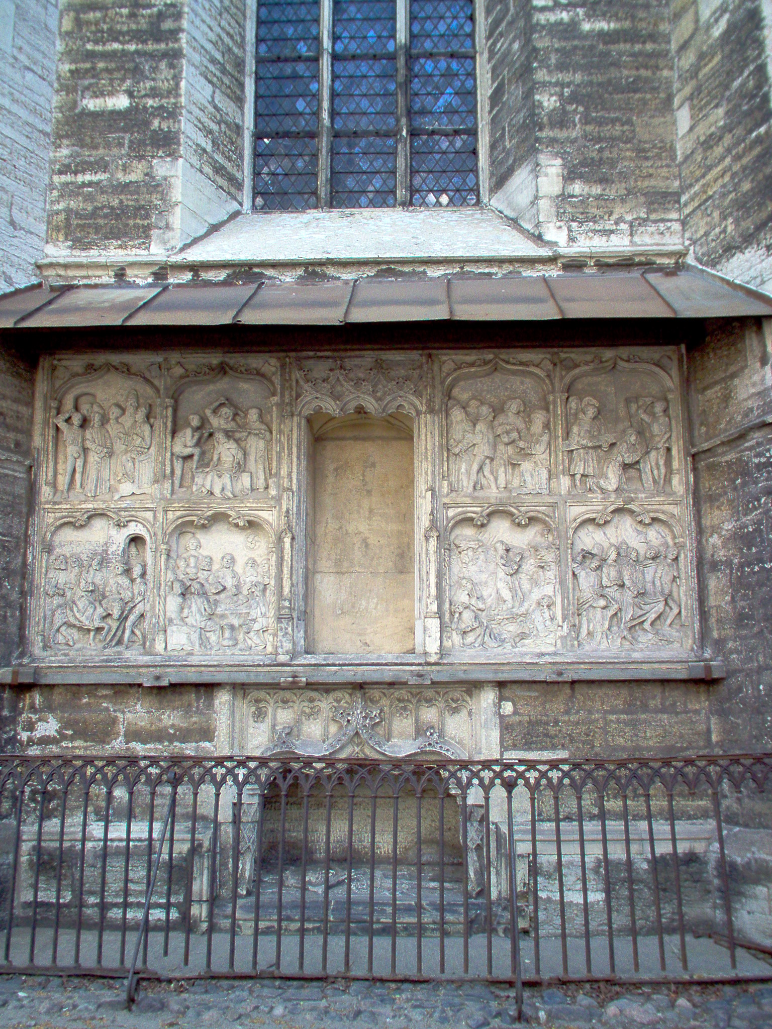 Kaupmees Hans Pawelsi kenotaaf Maarja kabeli idaküljel.